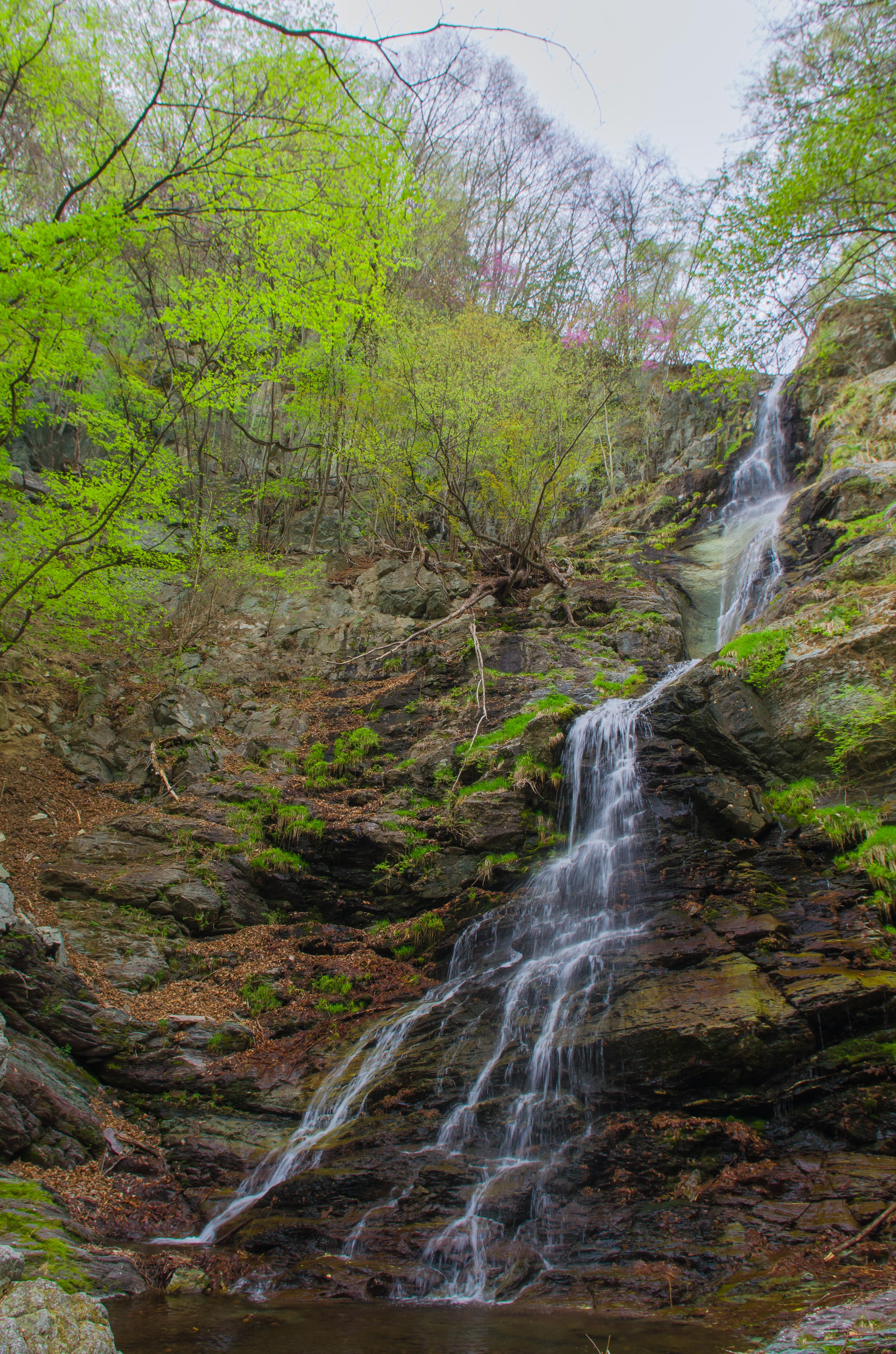 小豆の滝。群馬県多野郡神流町。